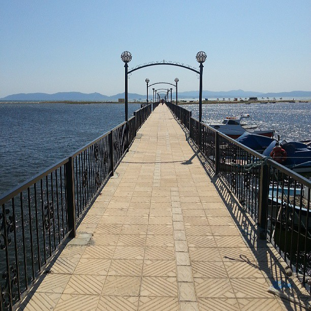 Altınova Köprüsü'nden bir görüntü.